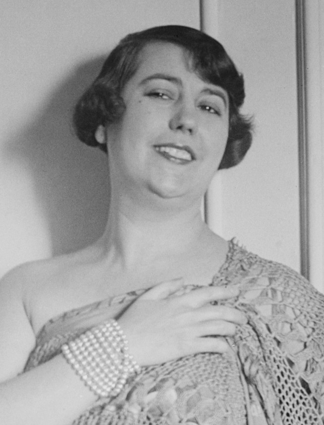 Elvira de Hidalgo (1891 - 1980), Spanish coloratura soprano, singing teacher